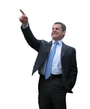 Nicolas Sarkozy à la Défense (Paris)